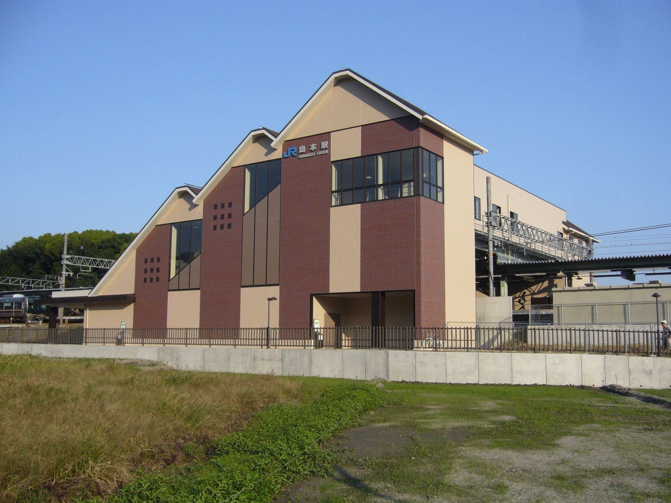 東海道本線（JR京都線）島本駅の西口。同駅の裏口に相当する。